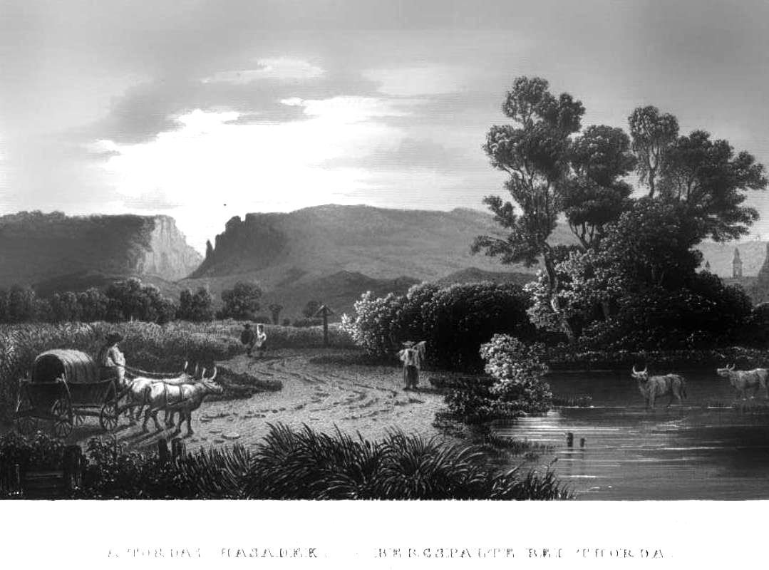 Cheile Turzii